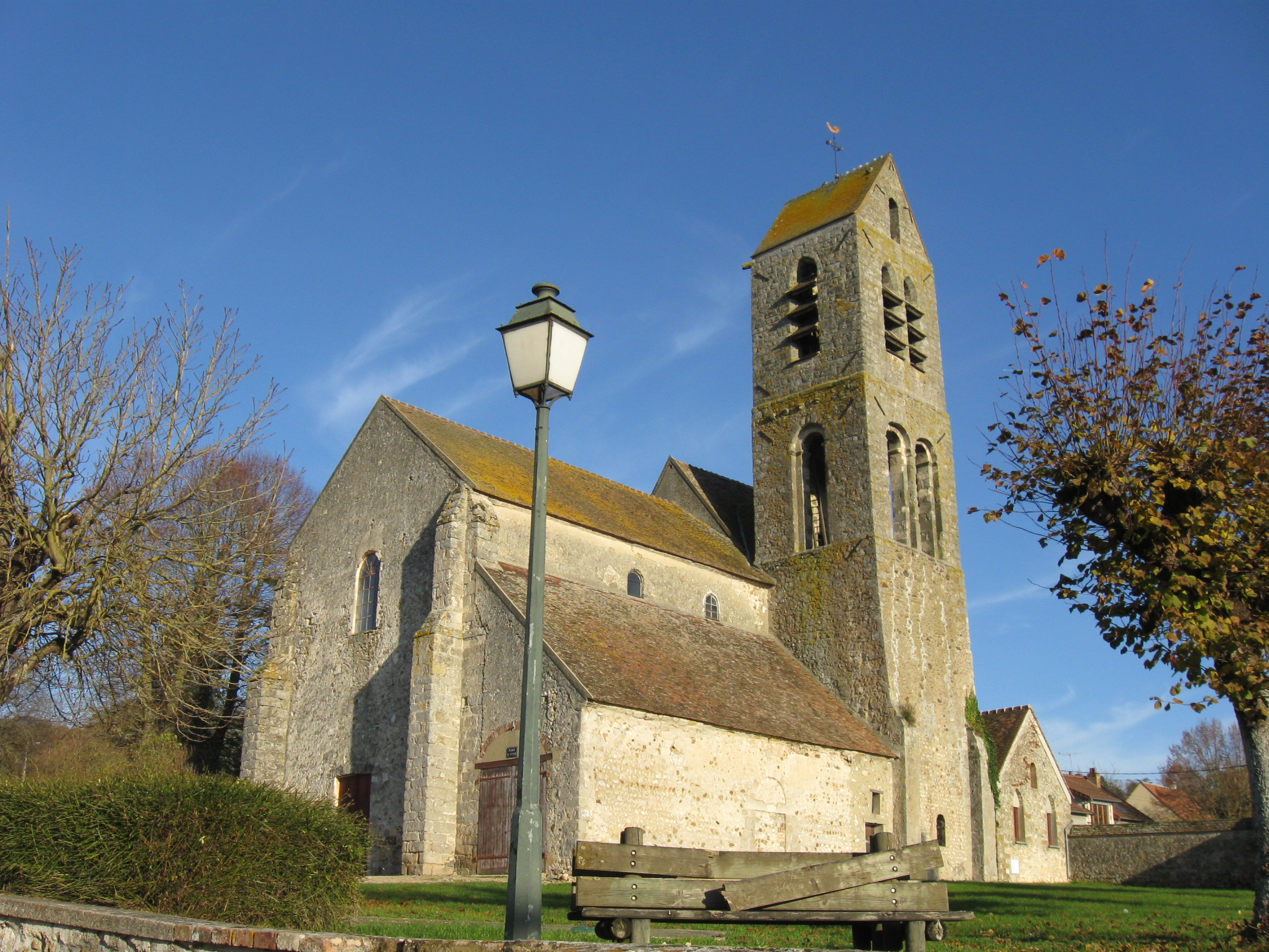 Église Saint-Germain et Saint-Laurent de Saint-Germain-Laval (département de la Seine-et-Marne, région Île-de-France).